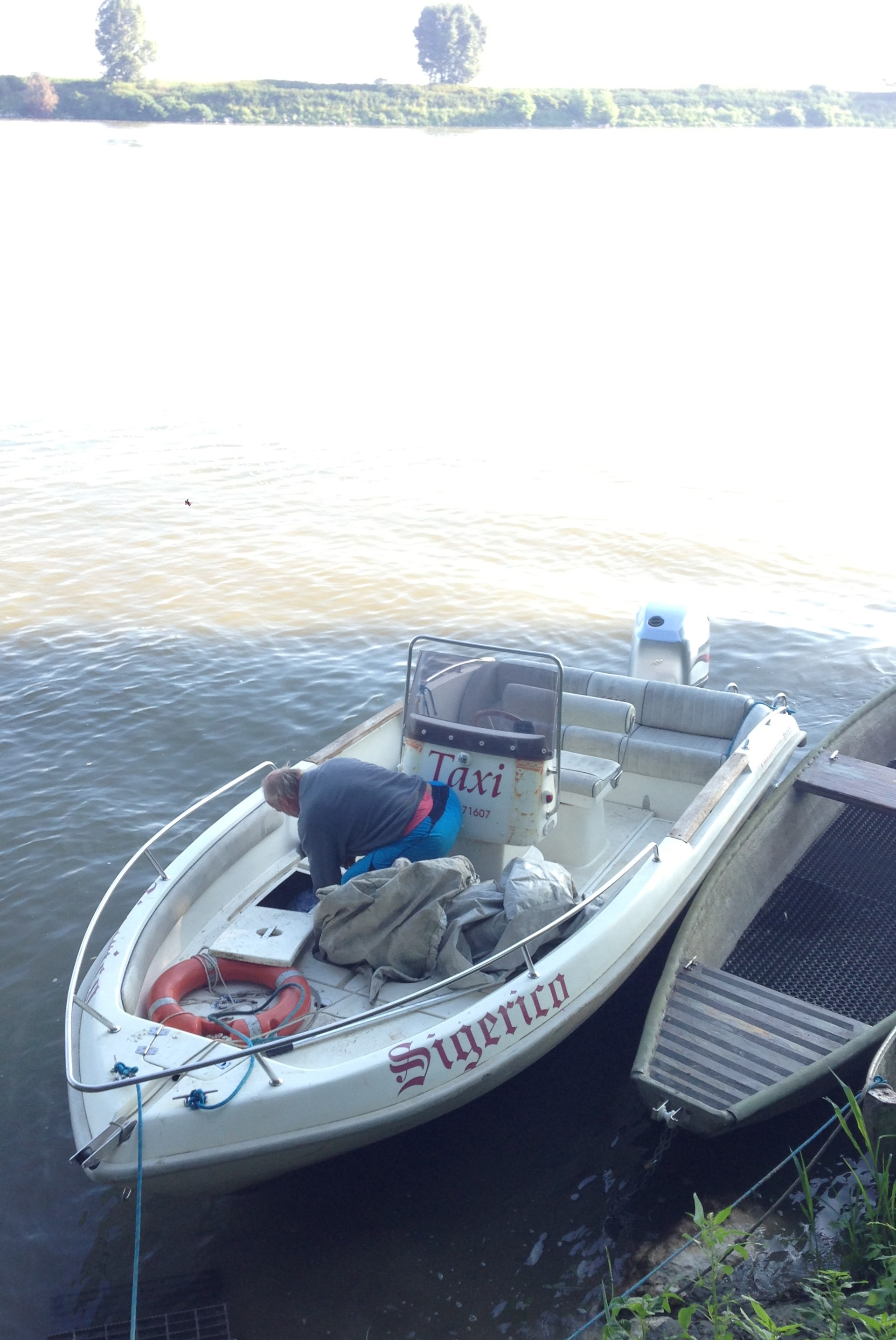 Taxi Barca para efectuar el Transitus Padi